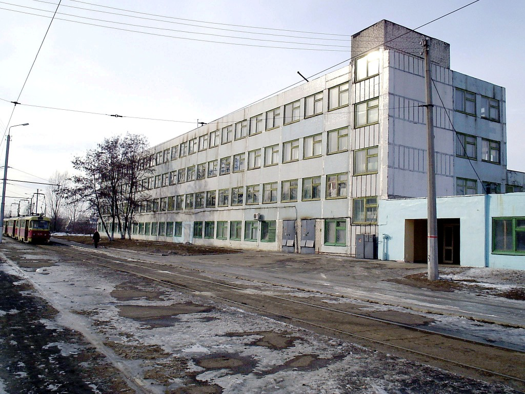 Административно-бытовой корпус и диспетчерская Восточного депо